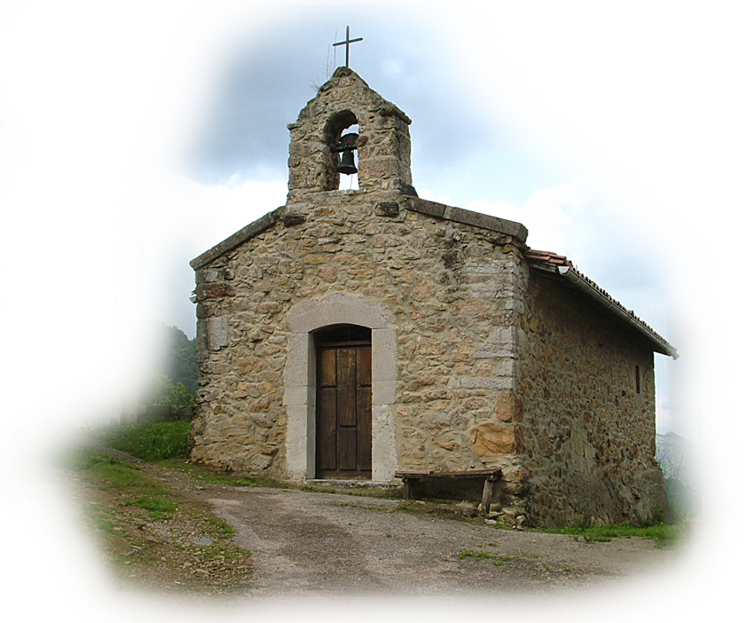 Ermita de Santa Cecilia en el Vallín